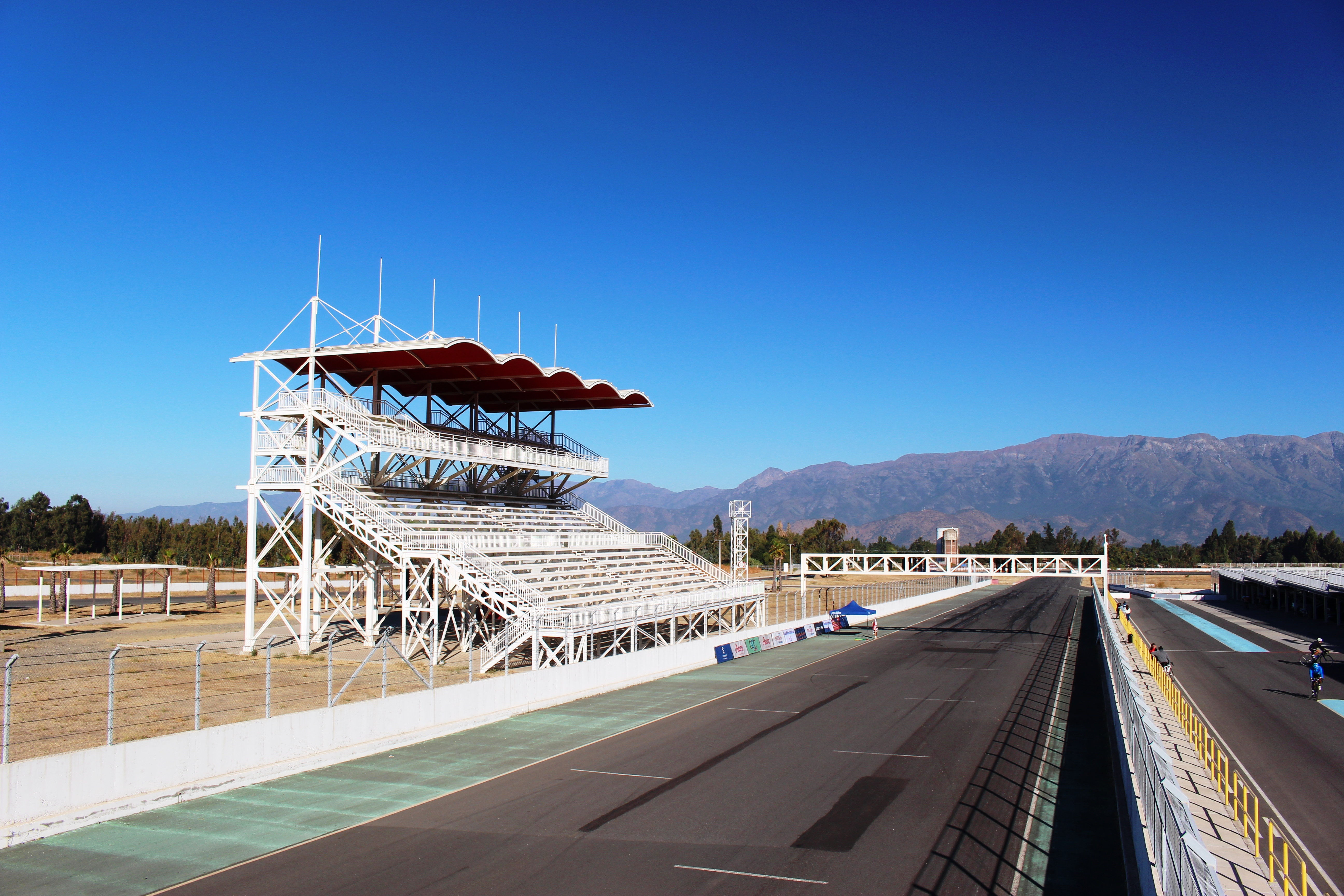 Interior Autódromo Internacional de Codegua, comuna de Codegua